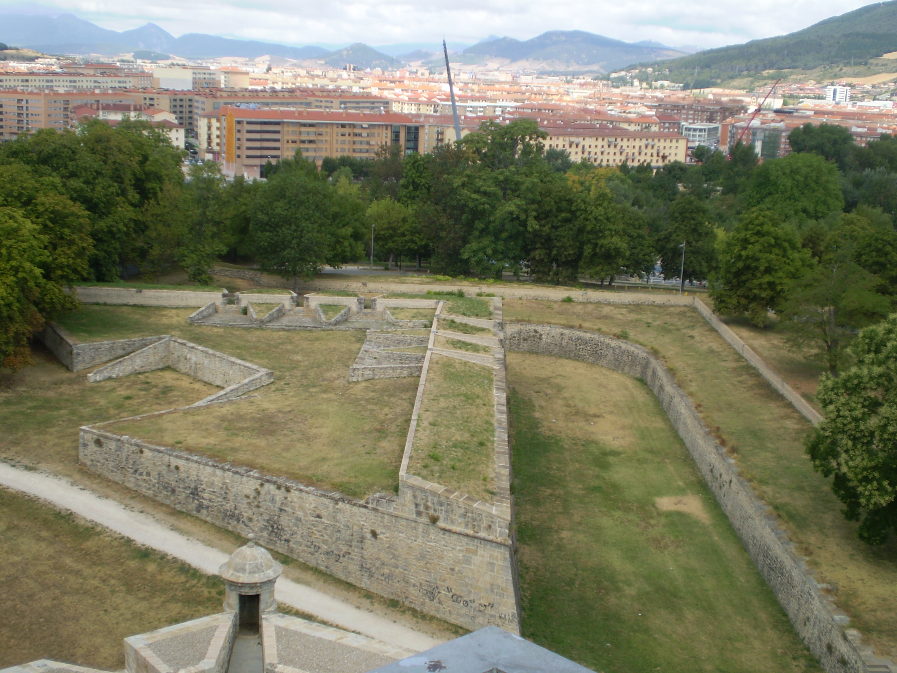 Vista del Barrio de la Rochapea de Pamplona desde el mirador del baluarte del Redín. En primer plano las contraguardias de la muralla